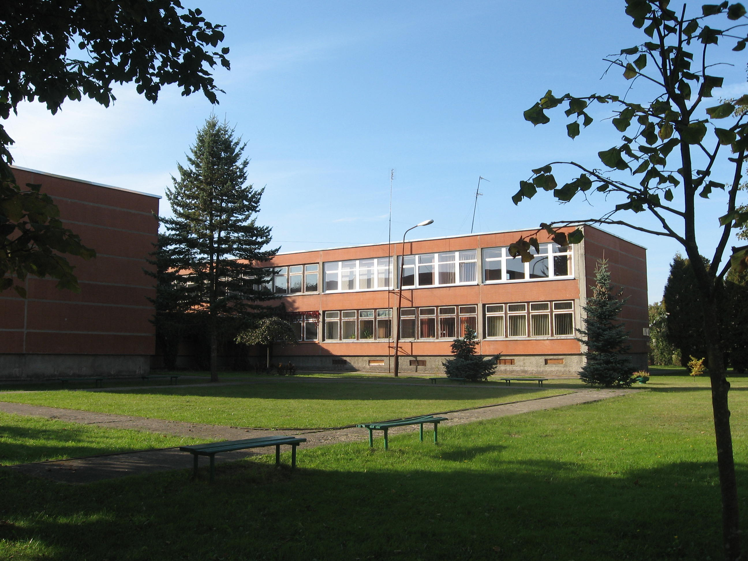 Šilutės jaunimo ir suaugusiųjų mokymo centras